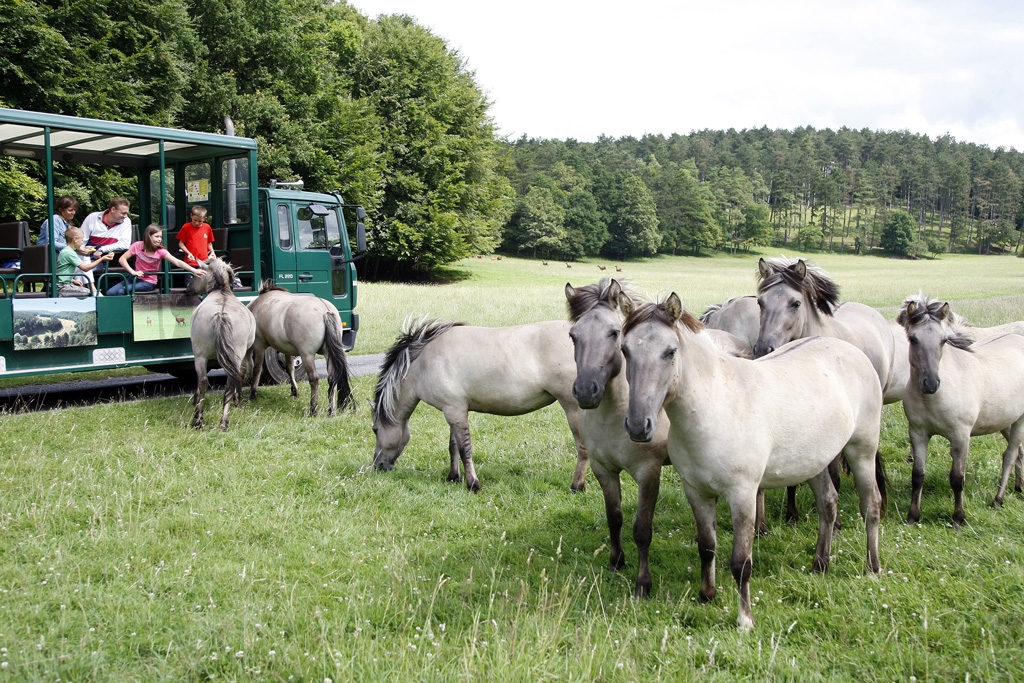 Les visiteurs du Domaine des grottes de Han peuvent approcher les tarpans en "safari car".